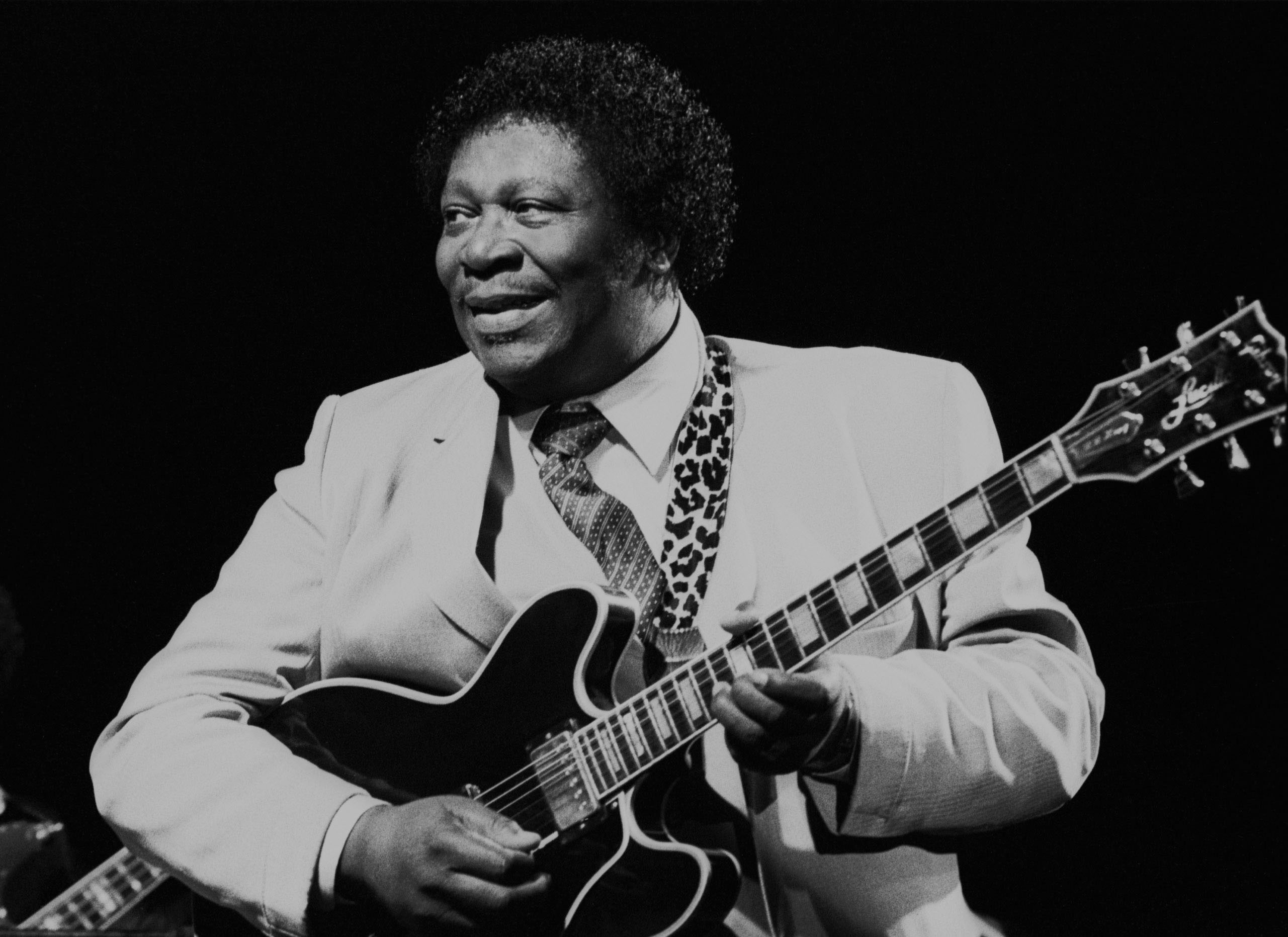 Il chitarrista blues B.B. King